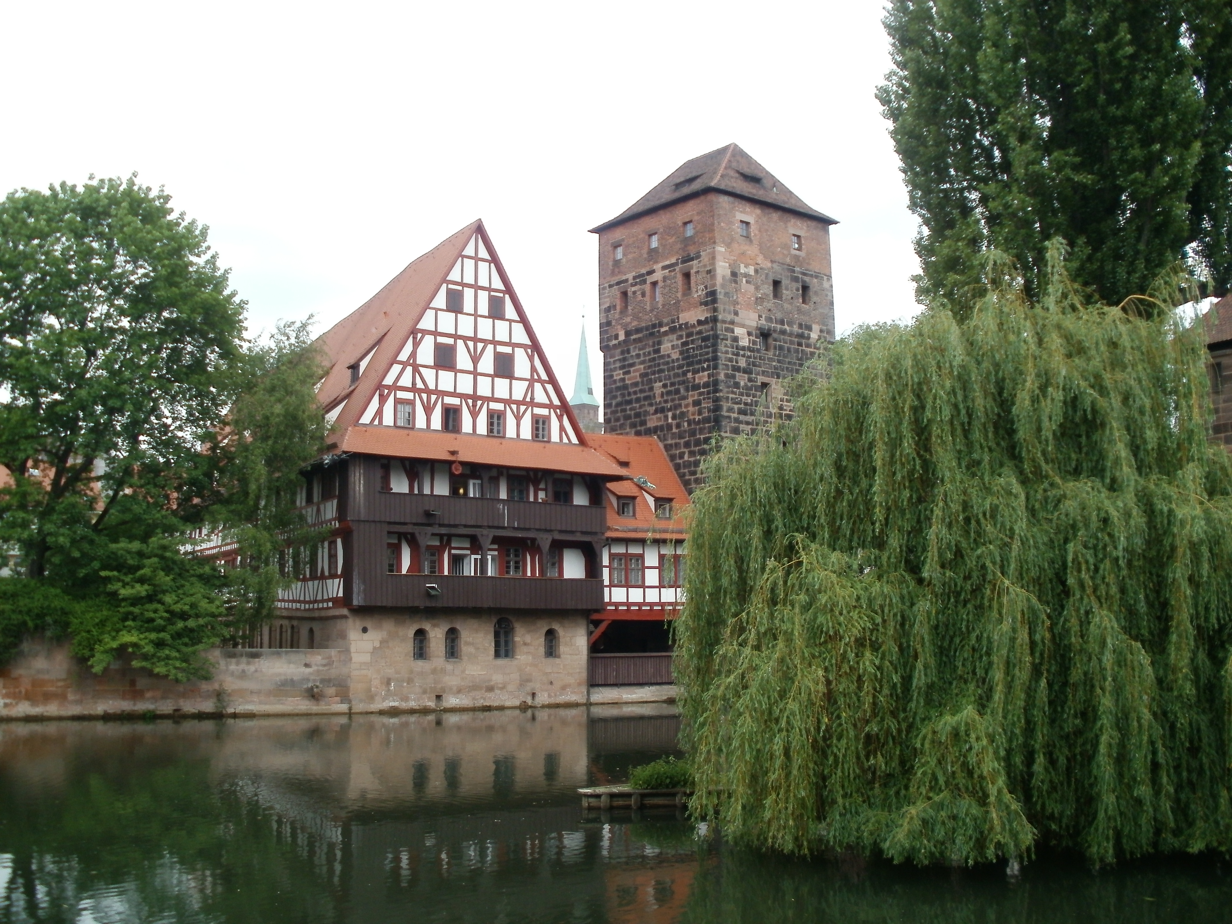 An der Pegnitz am Henkersturm